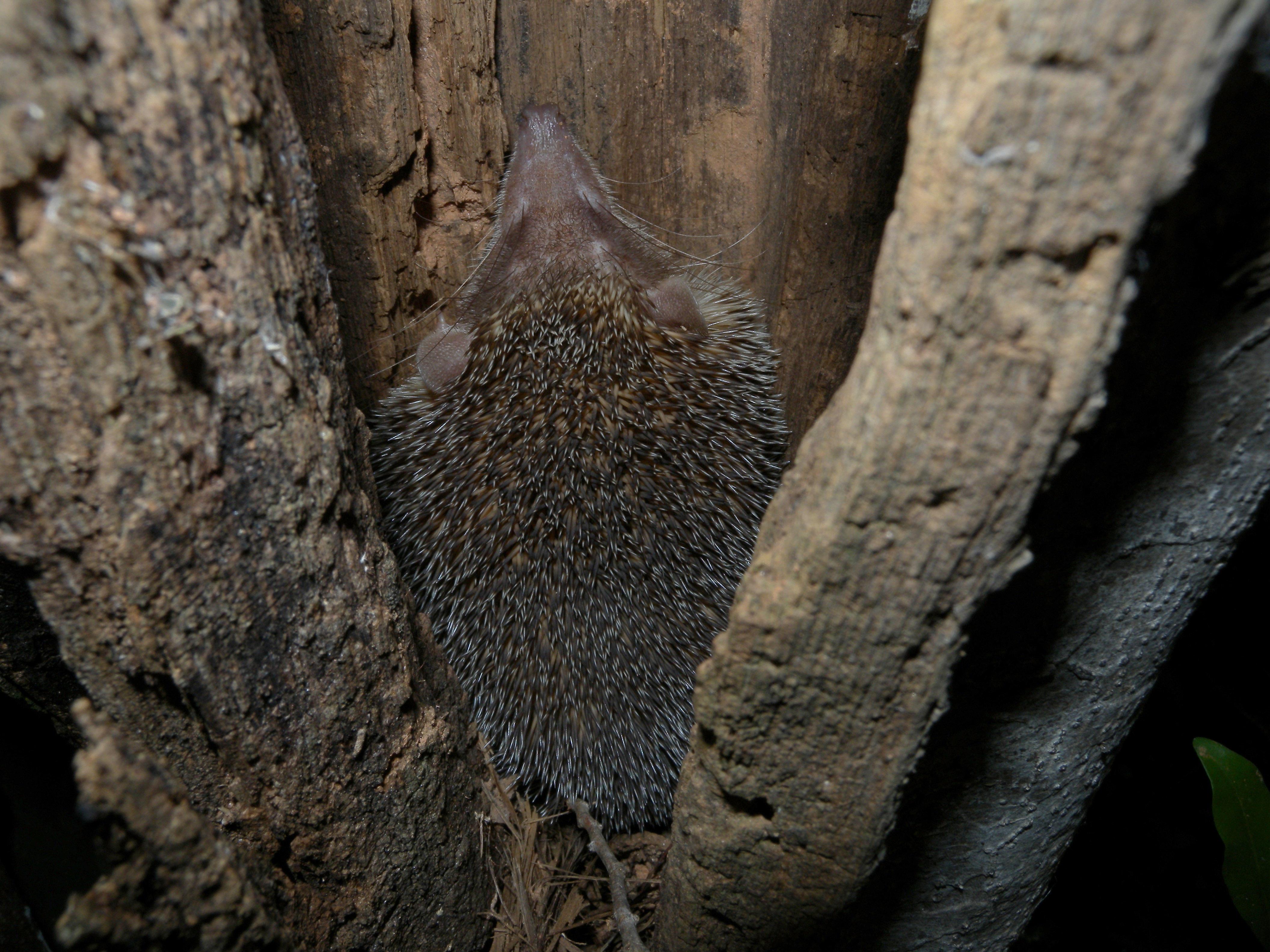 Greater Hedgehog Tenrec, Ankarafantsika National Park, Madagascar